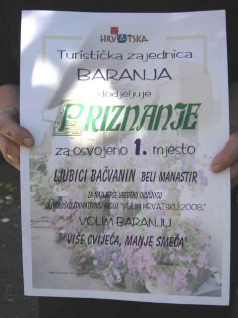 Volim Baranju, Beli Manastir, ekološka akcija; priznanje Ljubici Bačvanin